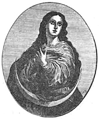 Image de la page 851 de la "Vie des Saints" en langue bretonne. Écrit par Yann-Vari Perrot et publié en 1912.